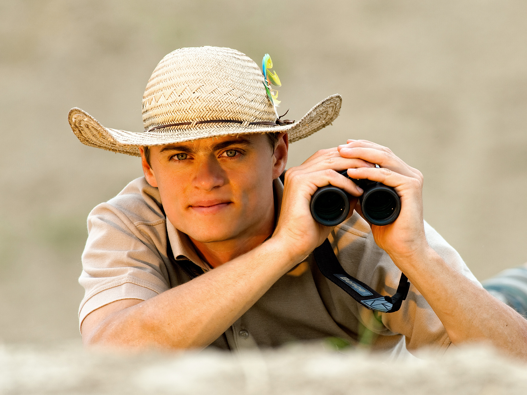 Máté Bence portréja (Pusztaszer)